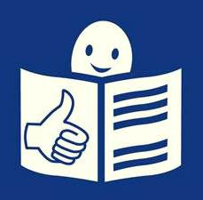 סמל "פישוט לשוני" שנוצר על-ידי אקים - אגודה לאומית לקימום אנשים עם מוגבלות שכלית התפתחותית בישראל